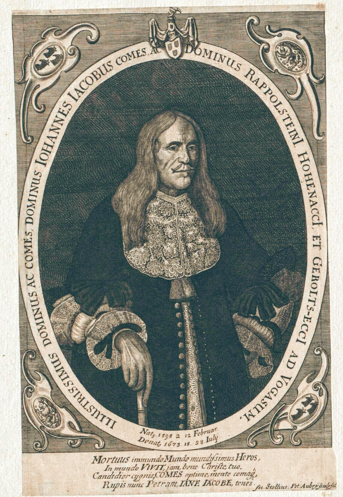 Johann Jakob, Graf von Rappoltstein (1598–1673). Reichsgraf und Herr der Grafschaft Rappoltstein, Herr zu Hohenack und Geroldseck am Wasichen